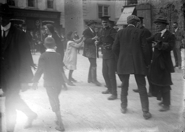 NLI Ref.: Ke 146